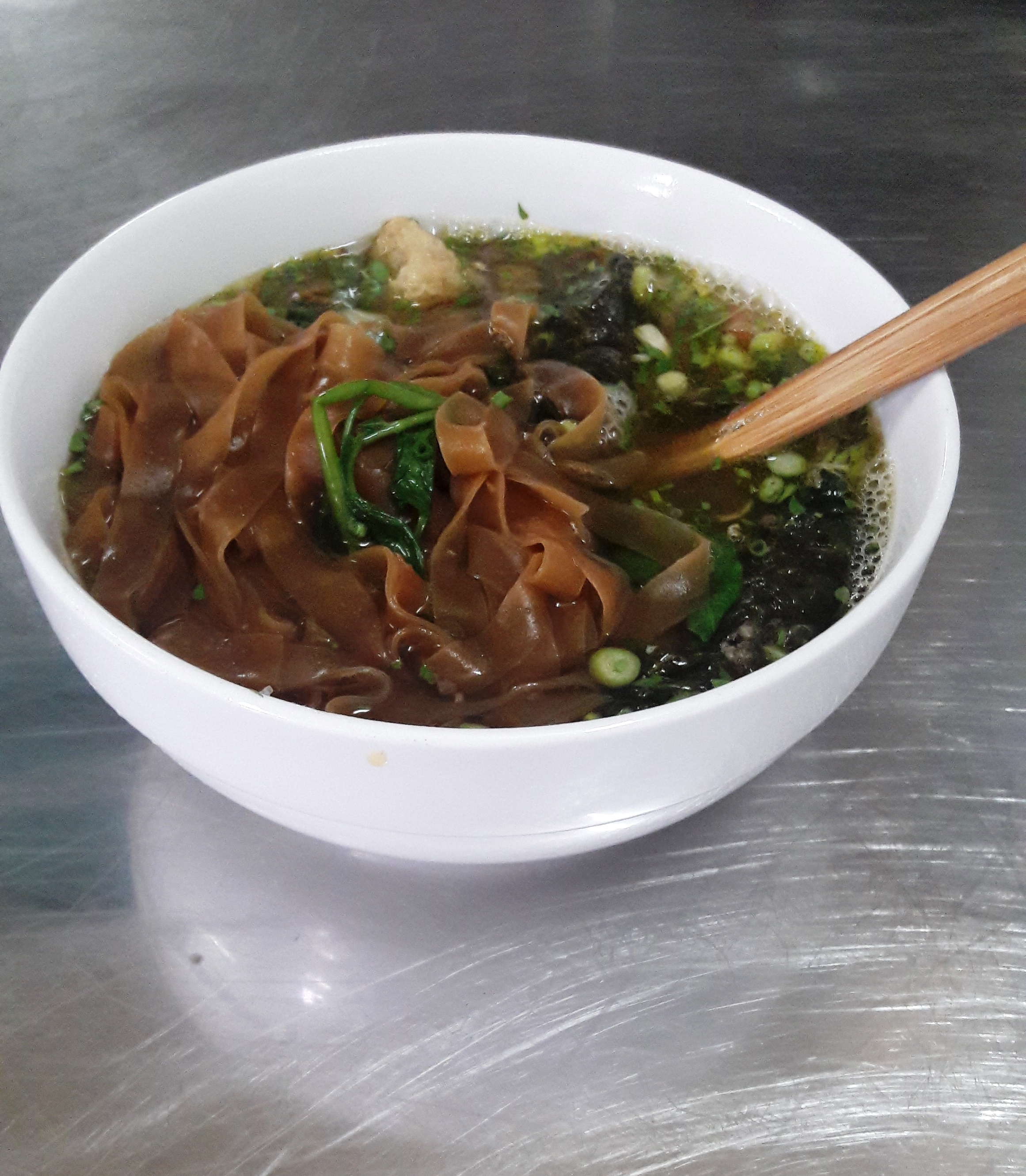 Cuisine of Vietnam